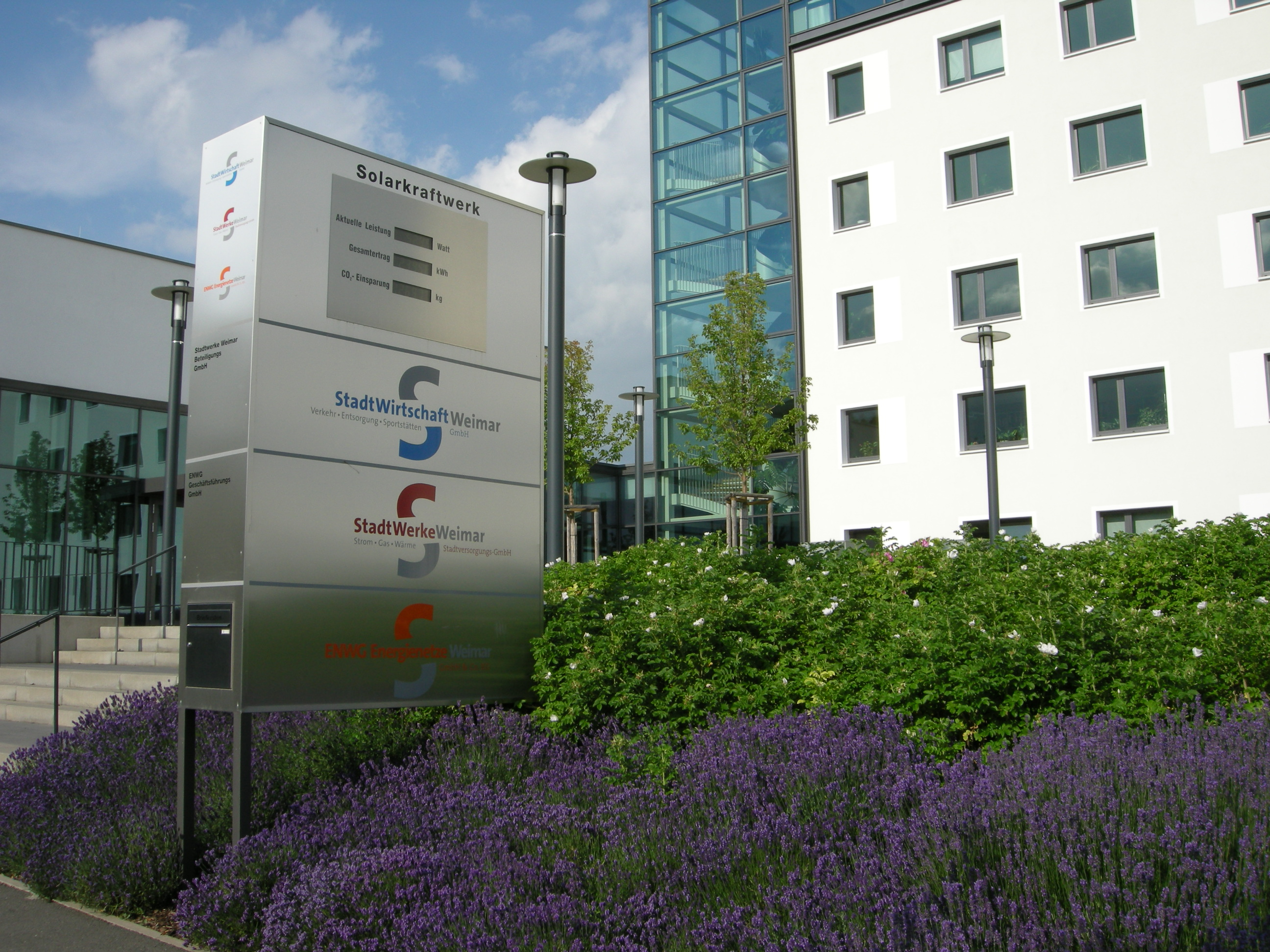 Eingang Firmenzentrale Stadtwerke Weimar Stadtversorgung-GmbH (SWW)